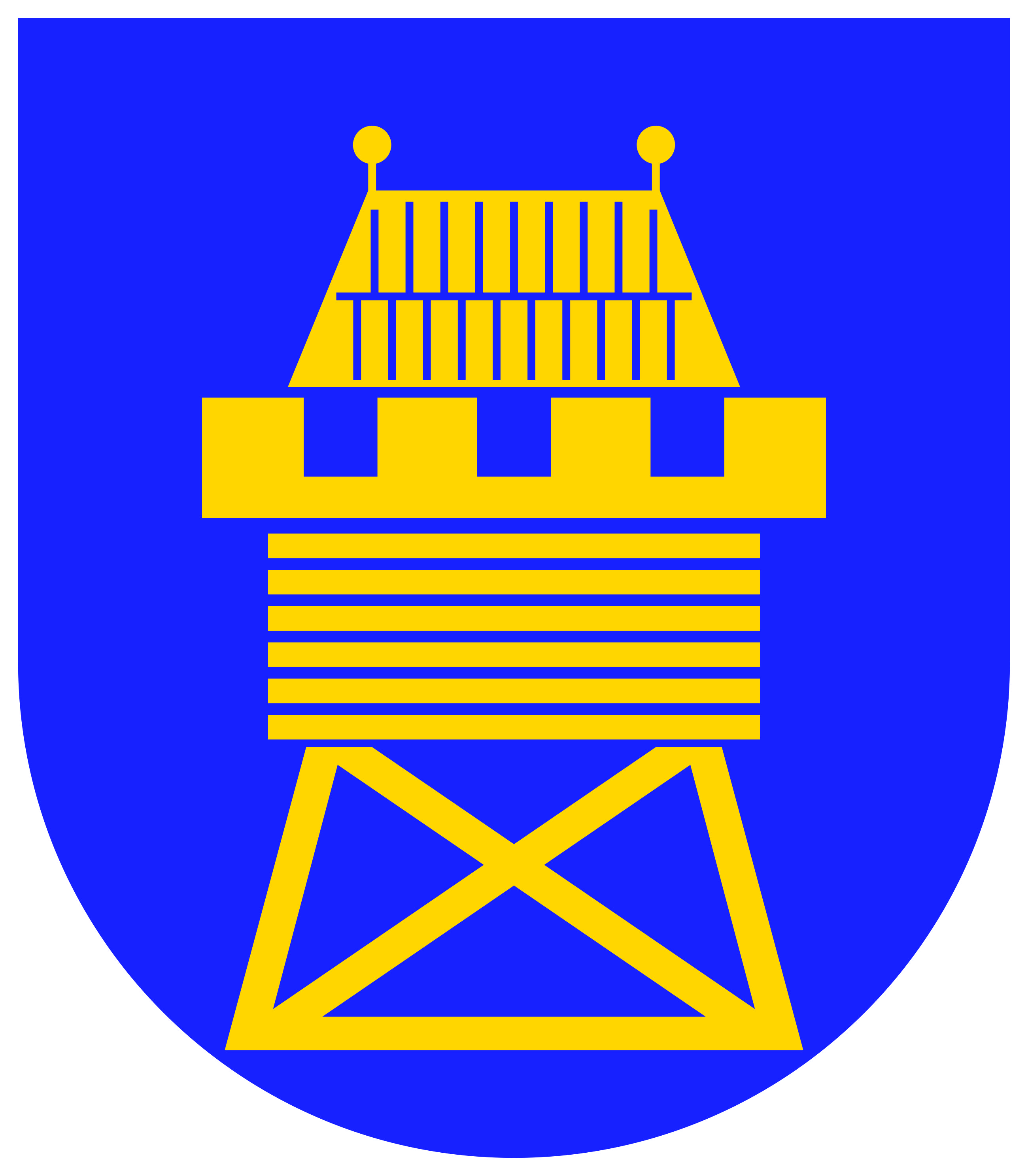 Znak - Odry